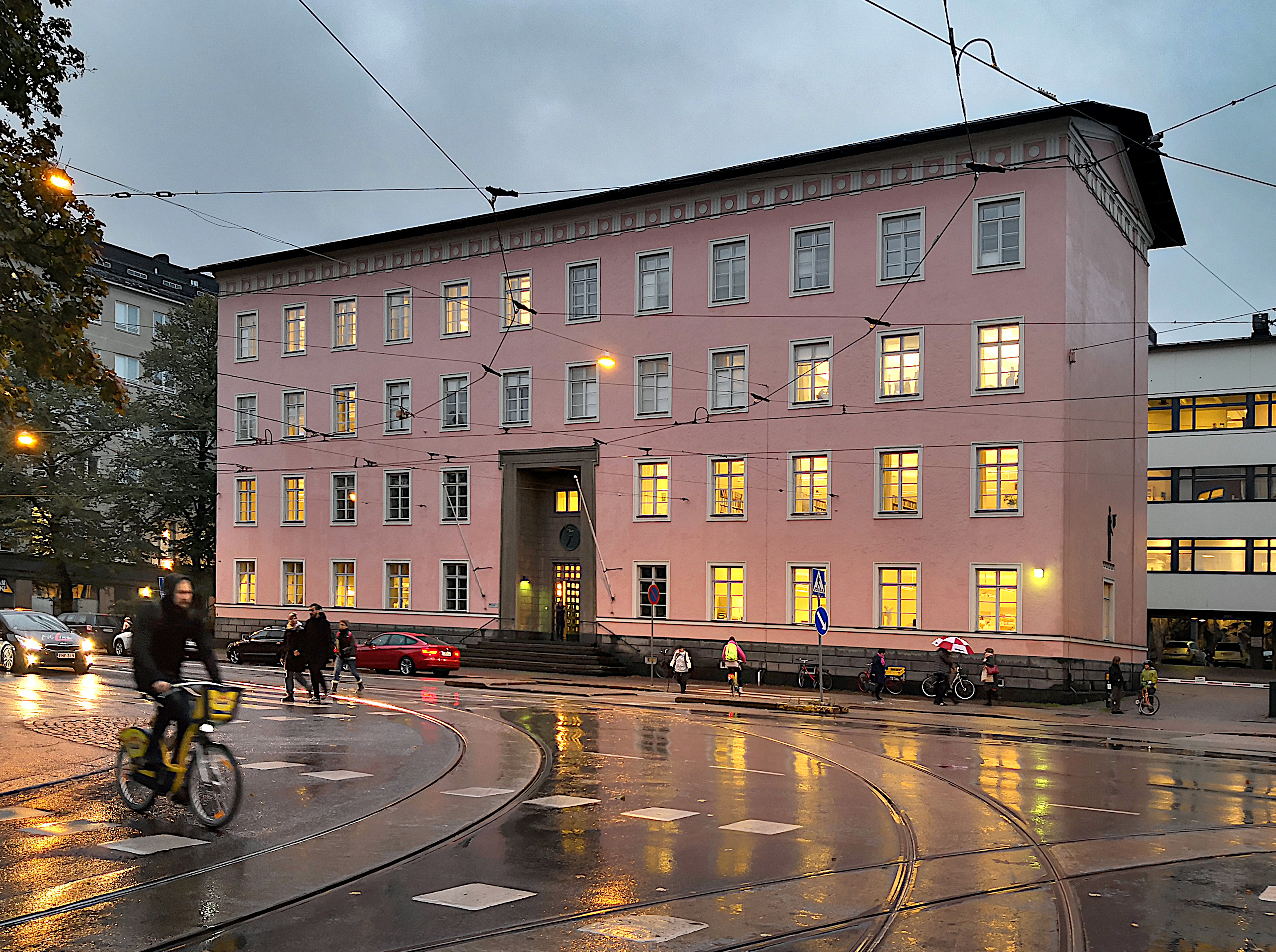 Helsingin suomenkielinen työväenopisto Original photo is